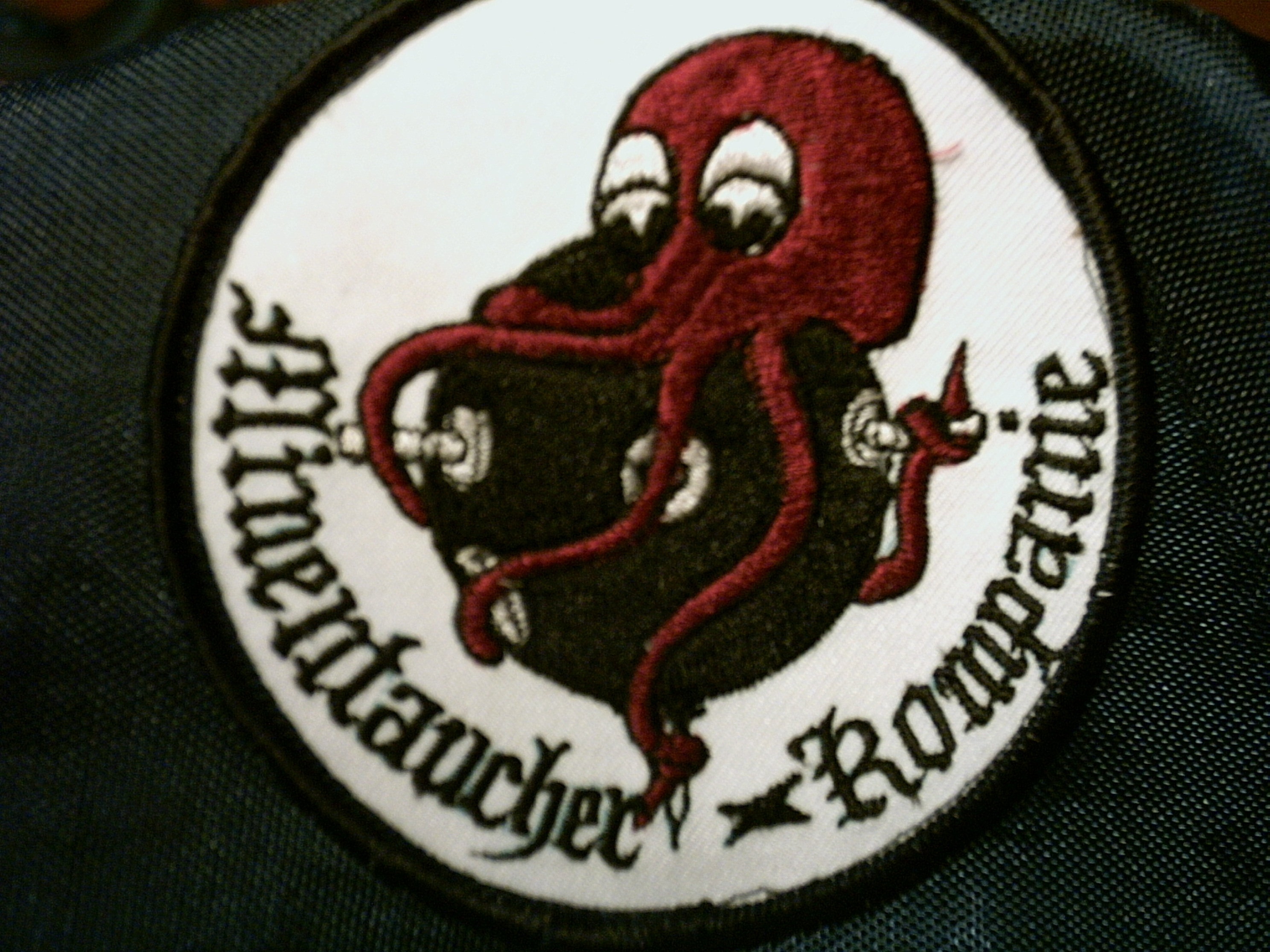 Own Work: Abzeichen (Logo) der Minentaqucherkompanie, Foto erstellt von Personaldisponent, aufgenommen am 02.06.06 Pitcure was manufactured by myself